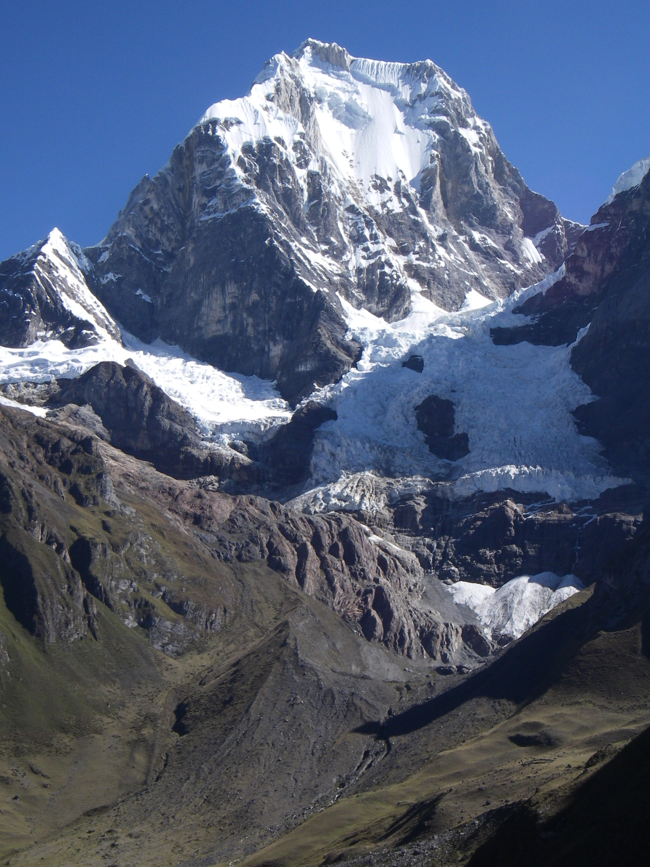 Bildbeschreibung: Yerupaja Grande, Cordillera Huayhuash, Peru Quelle: sebst fotografiert Fotograf/Zeichner: Thom95 Datum: 29.05.2006 Sonstiges: mit 6.635m zweithöchster Berg in den peruanischen Anden und höchster Gipfel der Cordillera Huayhuash